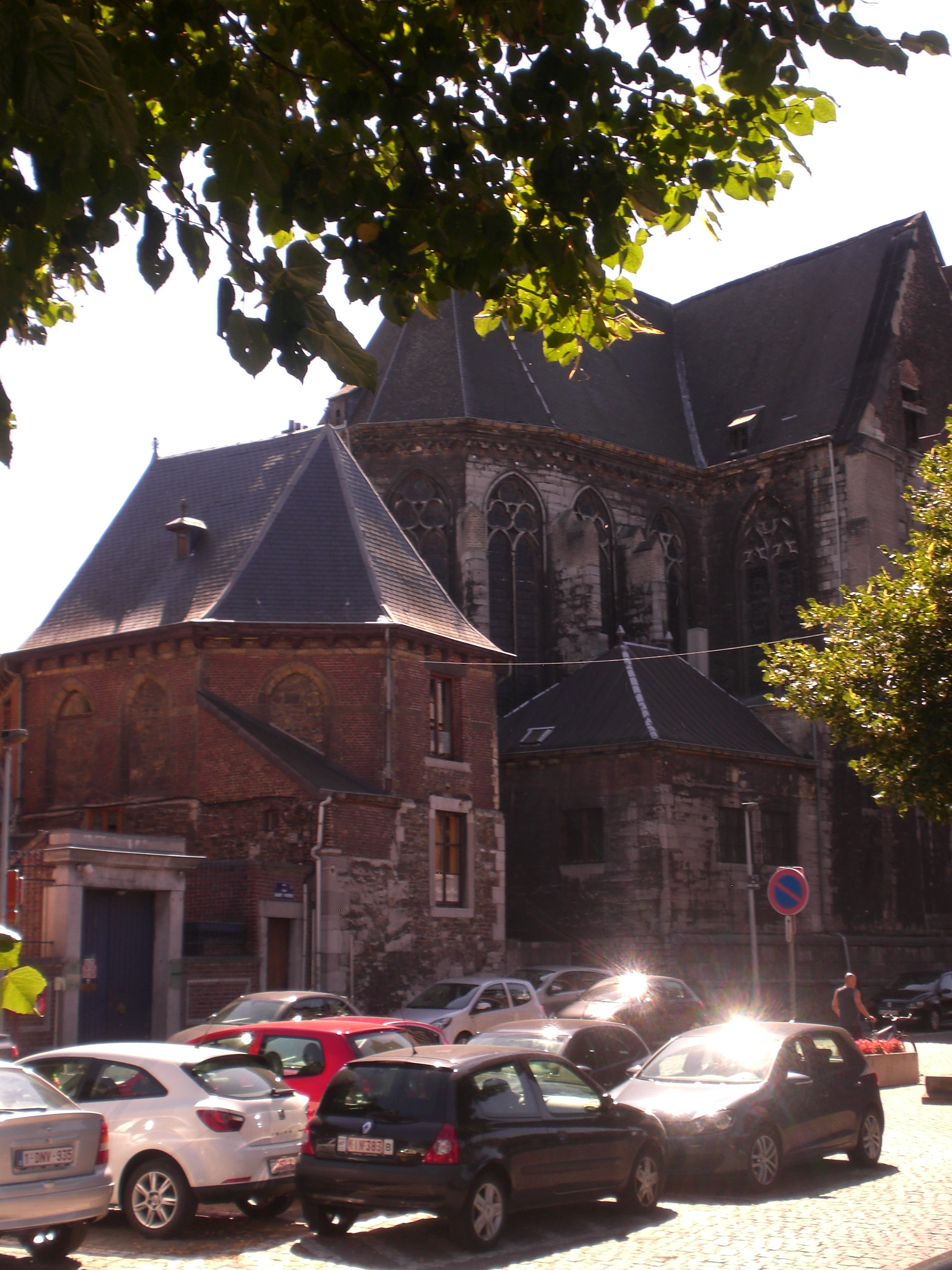 Saint-Nicolas aux mouches devant la collégiale Sainte Croix de Liège